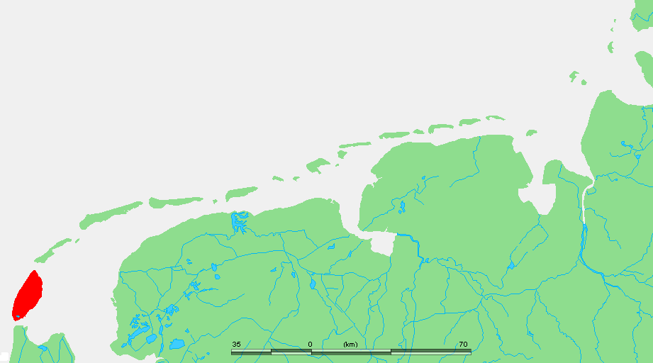 Wadden - Texel.PNG